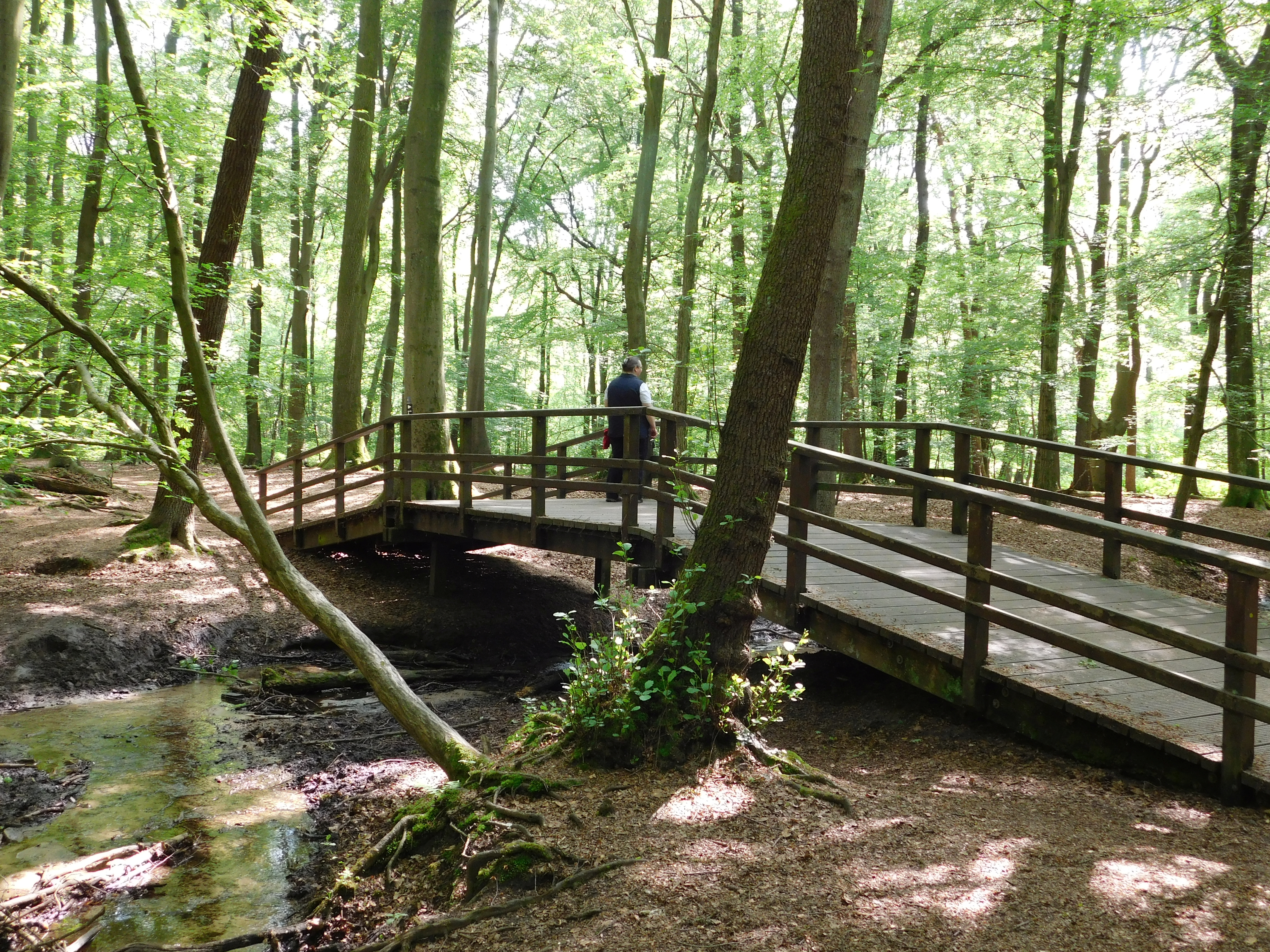 Brücke über den Hoppersheider Bach im Dünnwalder Wald, Naturschutzgebiet „Nittum-Hoppersheider Bruch“ (NSG GL-032), Bergisch Gladbach.